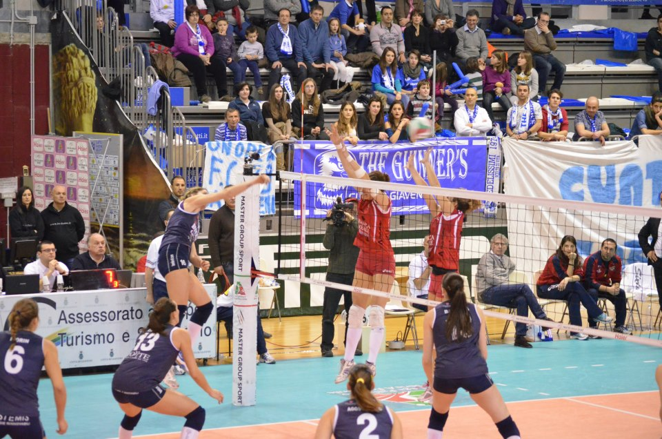 L'Imoco Volley nella stagione 2012-13